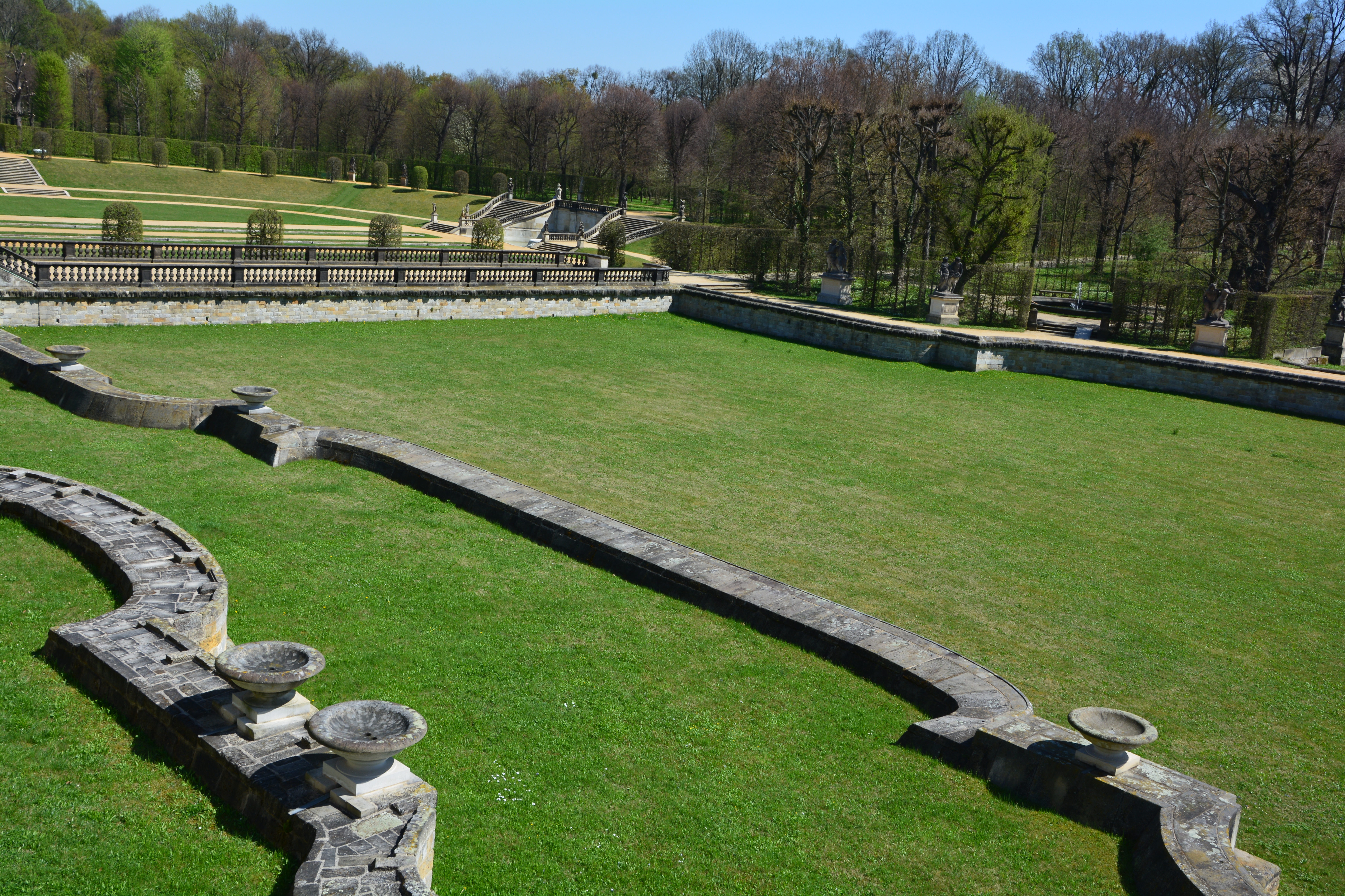 Barockgarten Großsedlitz